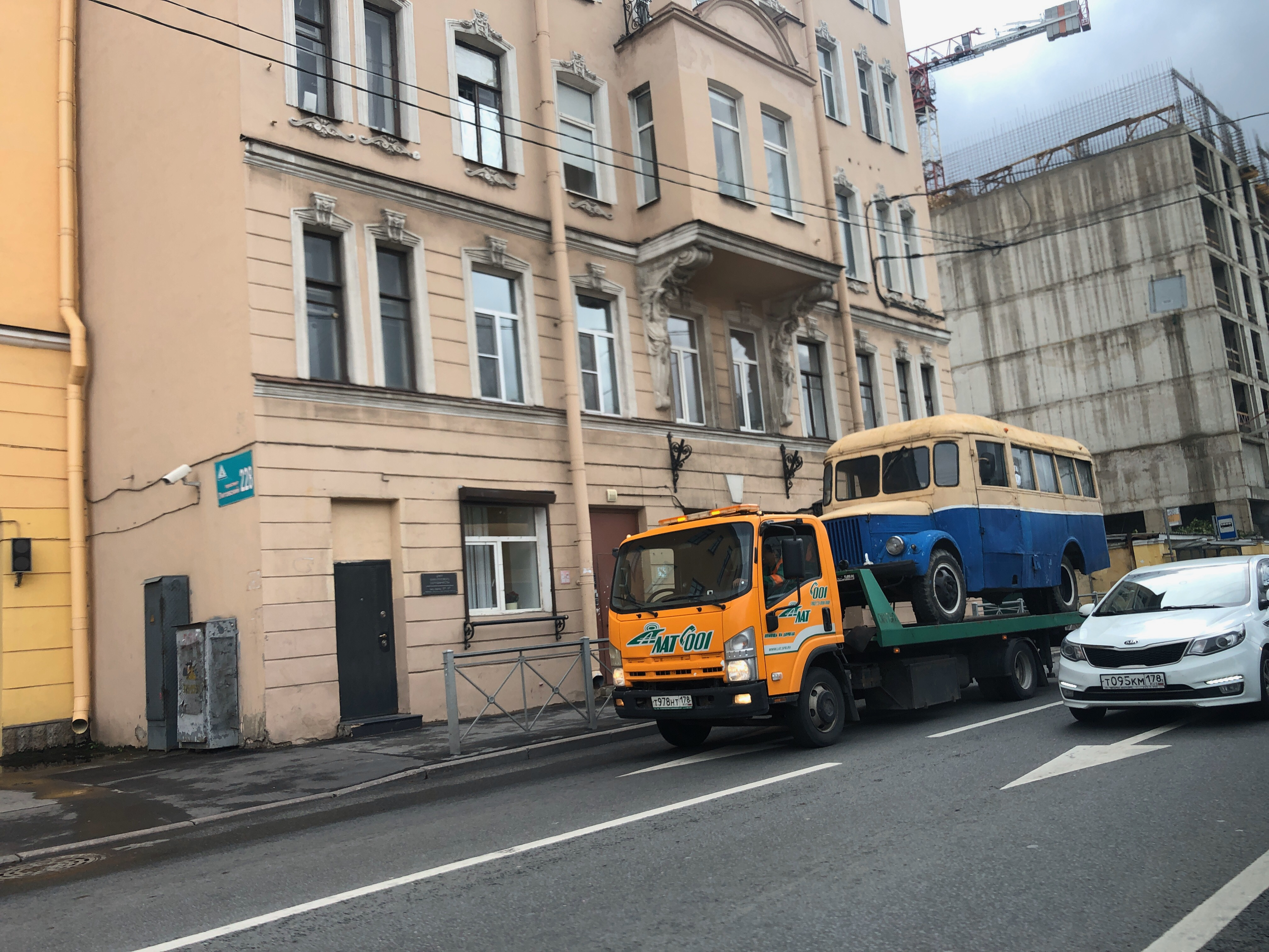 Лиговский проспект